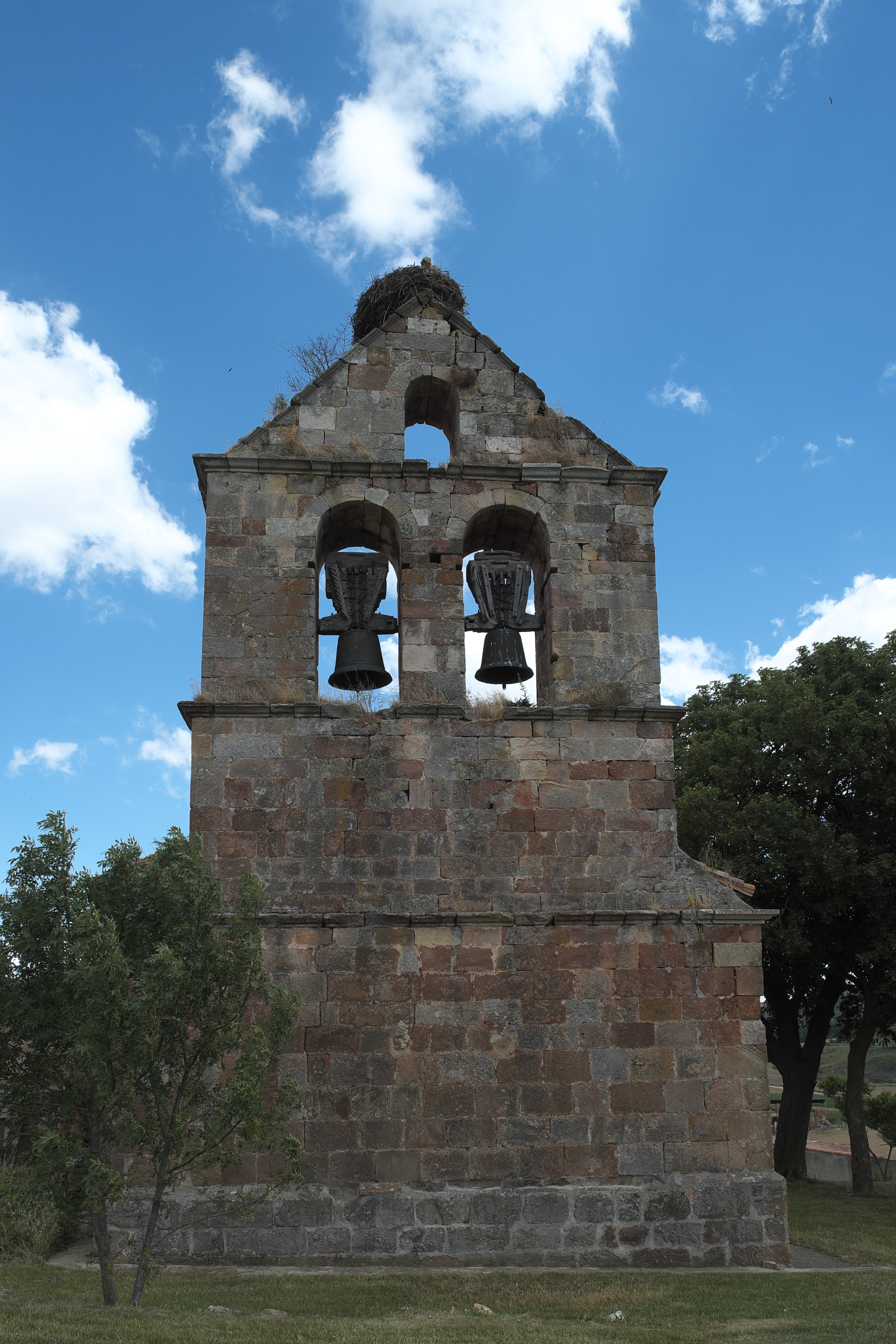 Katholische Kirche San Miguel in Valoria de Aguilar, einem Ortsteil von Aguilar de Campoo in der Provinz Palencia (Kastilien-León/Spanien), Glockengiebel (espadaña)